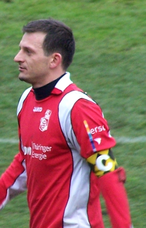 Kapitän Alexander Schnetzler (Rot-Weiß Erfurt) nach dem Spiel gegen Dynamo Dresden